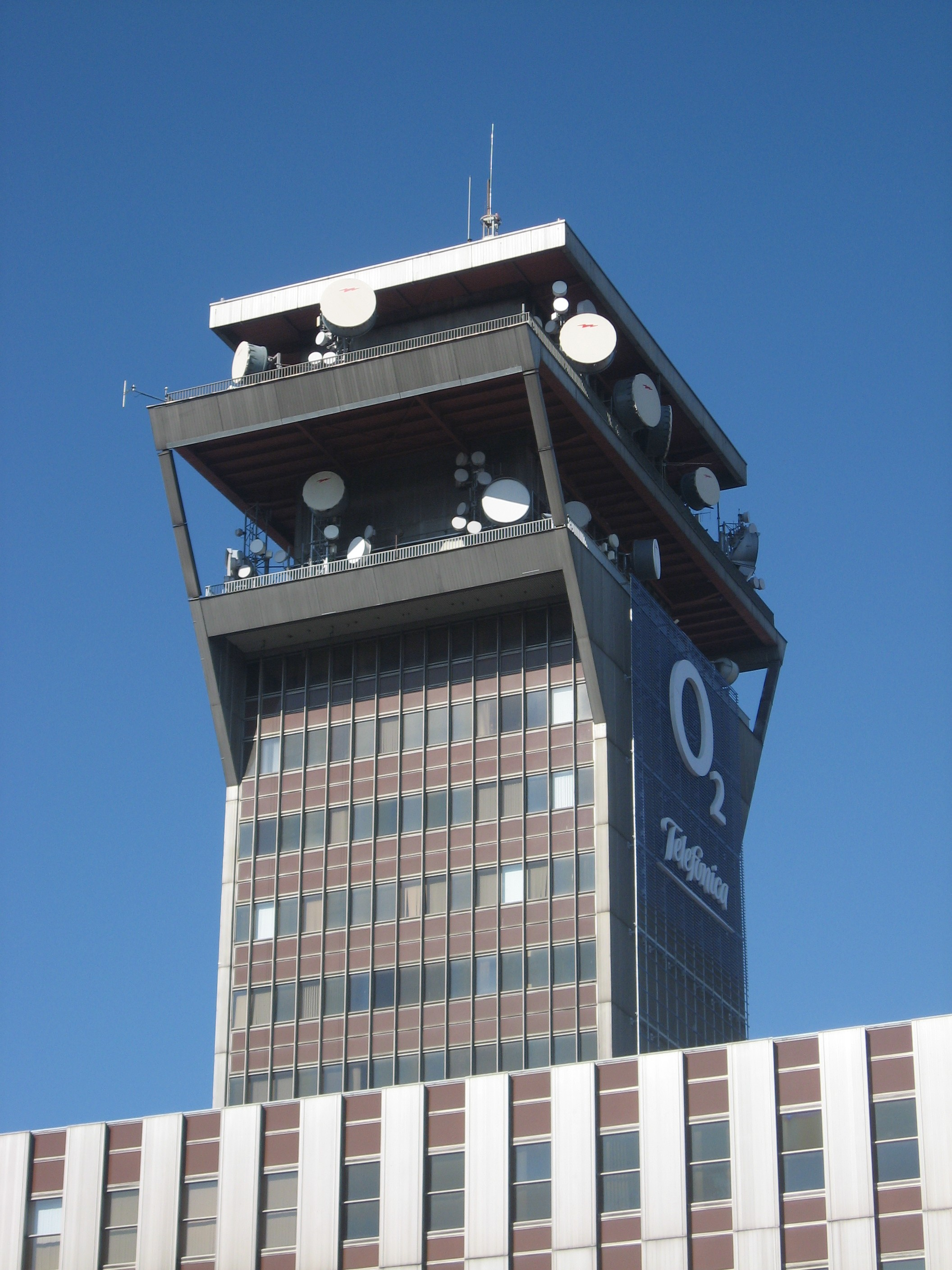 Věž Telefoniva O2